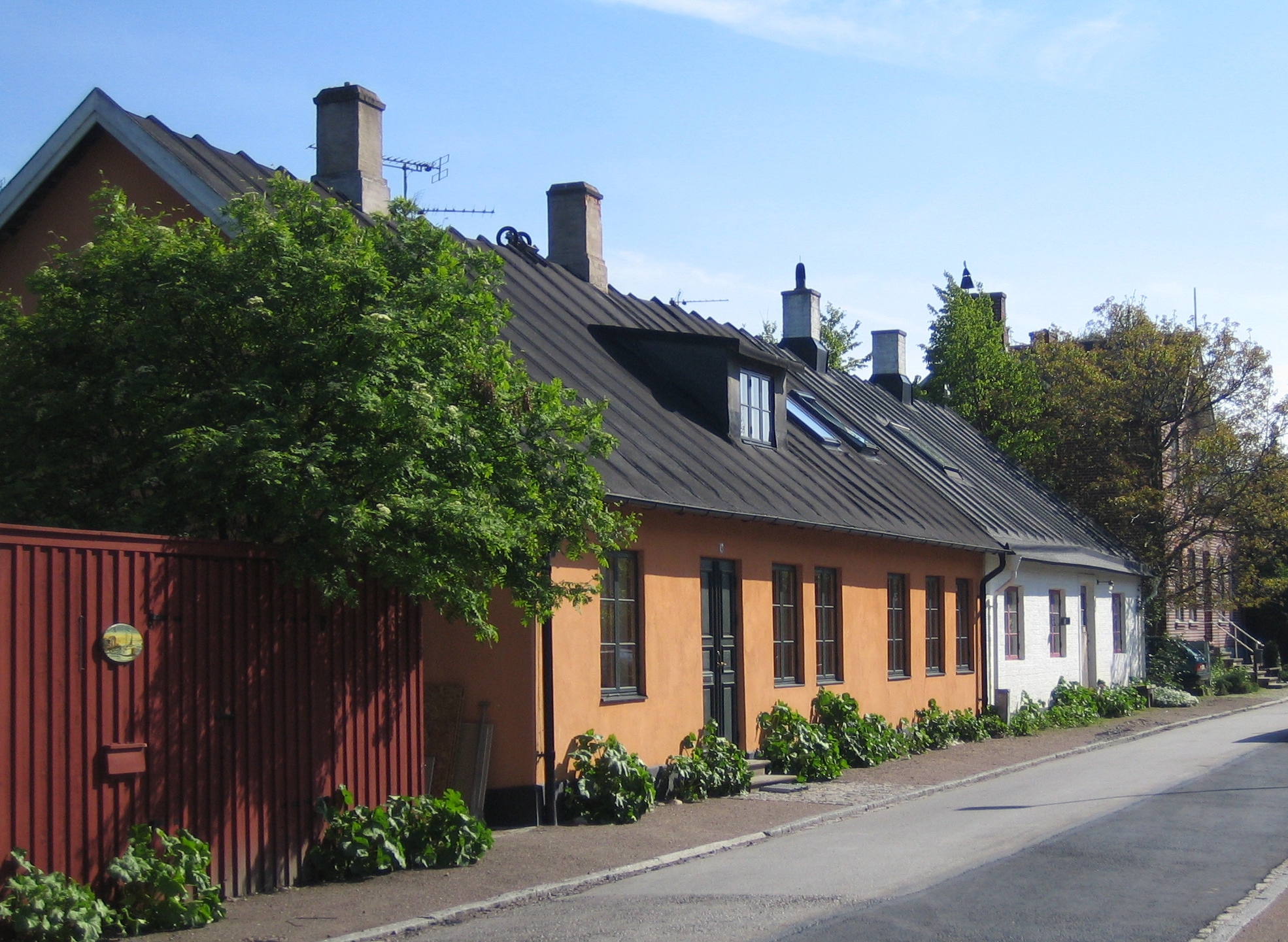 Limhamn, Malmö